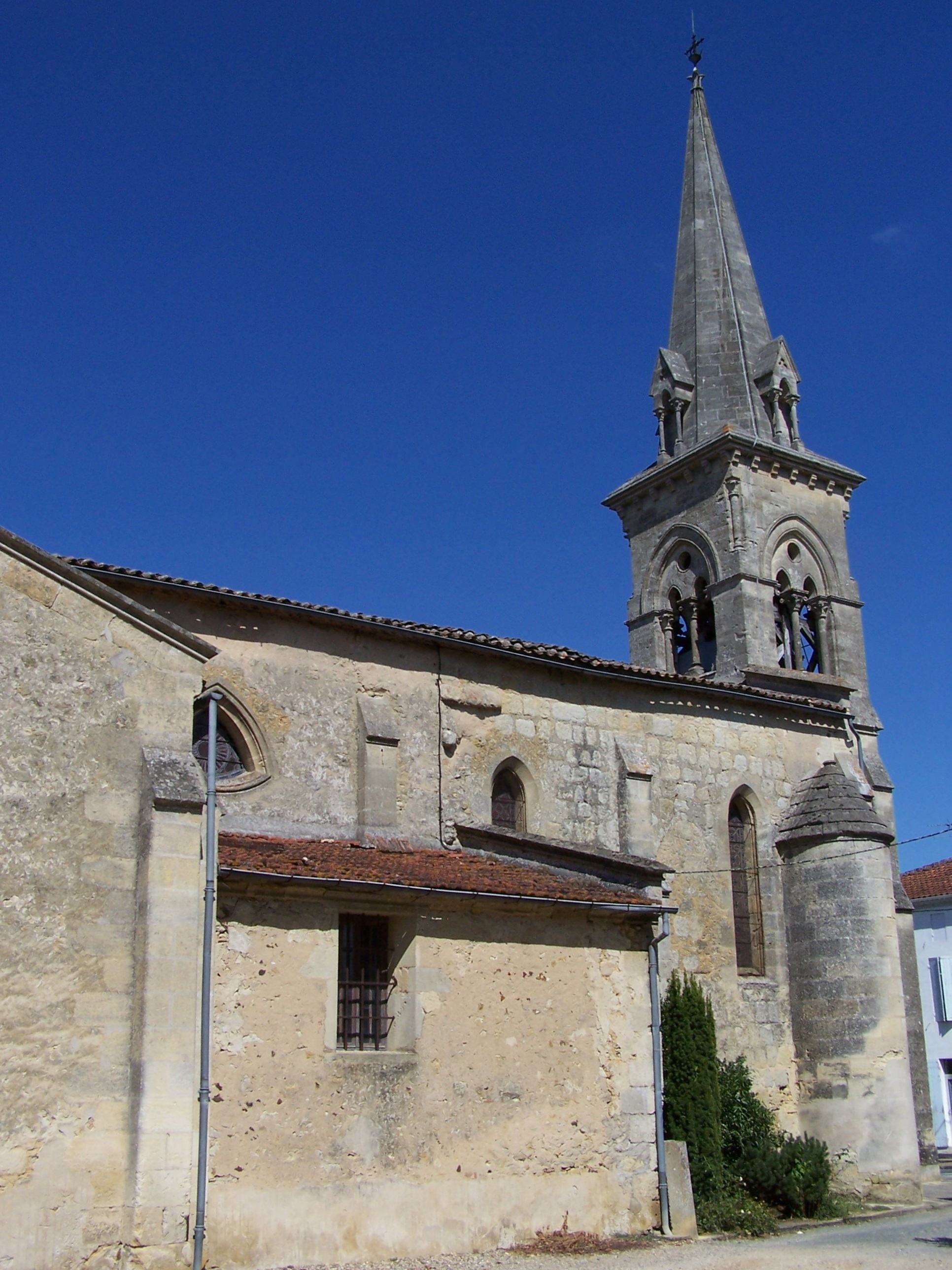 Église de Auros, Gironde, France